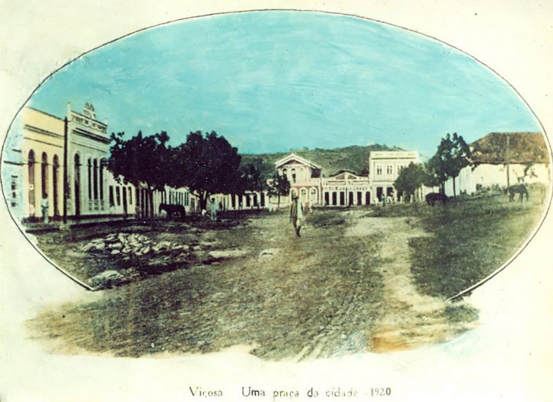 viçosa al